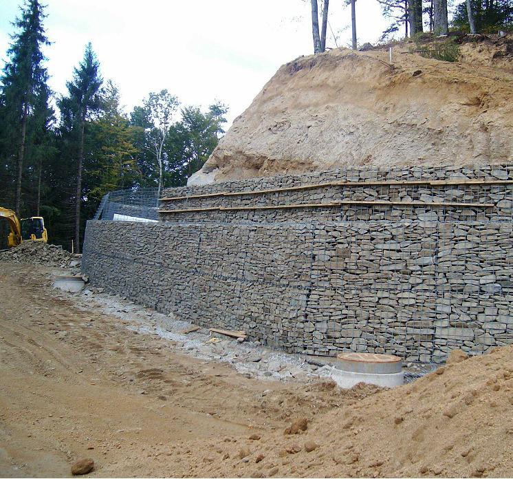 Kreisstraßenbau bei Ranfels/Bayerischer Wald mit Gabionenwand